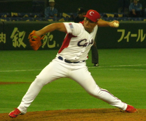 Norberto González